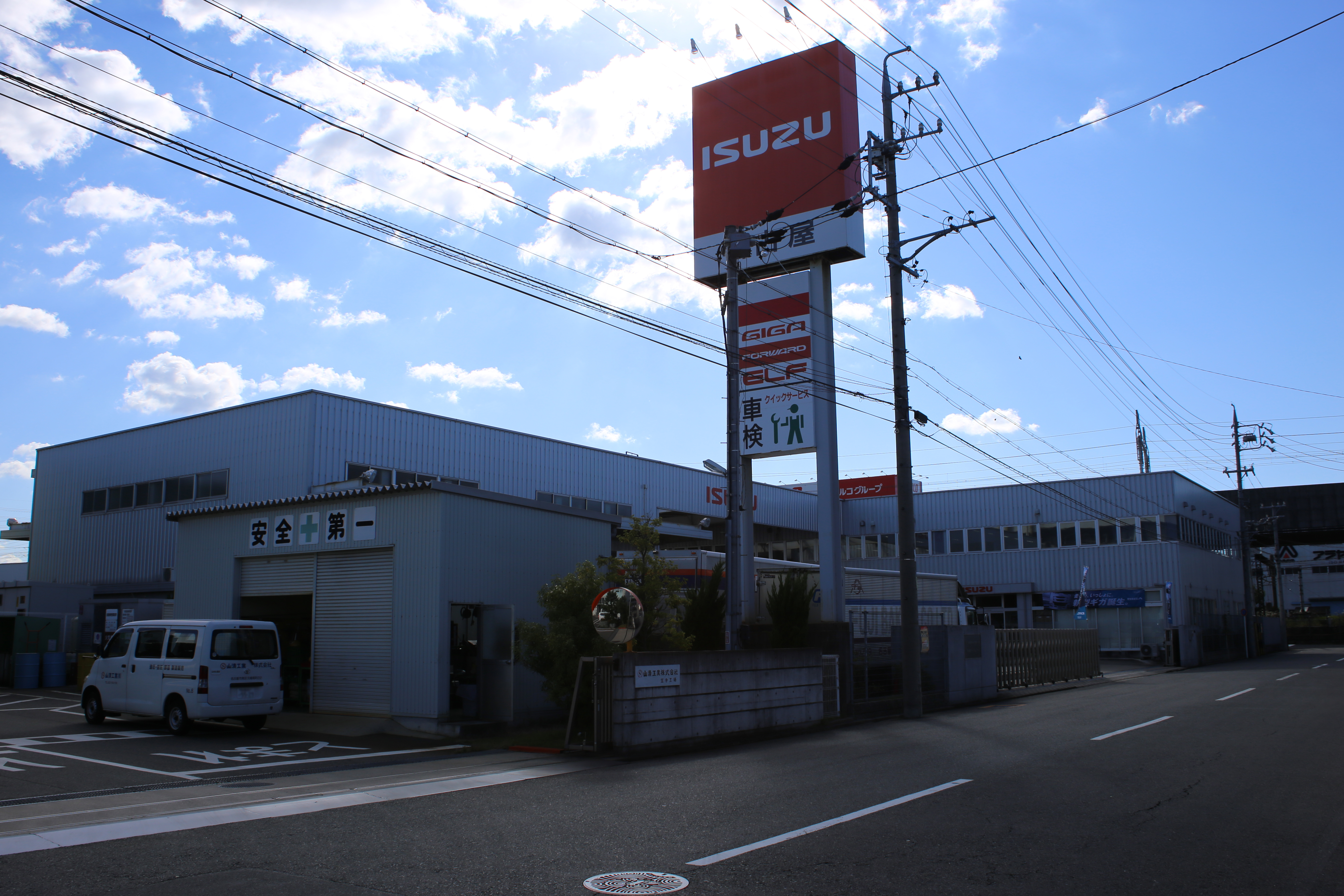 名古屋市南区塩屋町のいすゞ自動車東海北陸株式会社本社を北側公道東側より撮影。ただし、ナンバープレートにつき画像処理済。